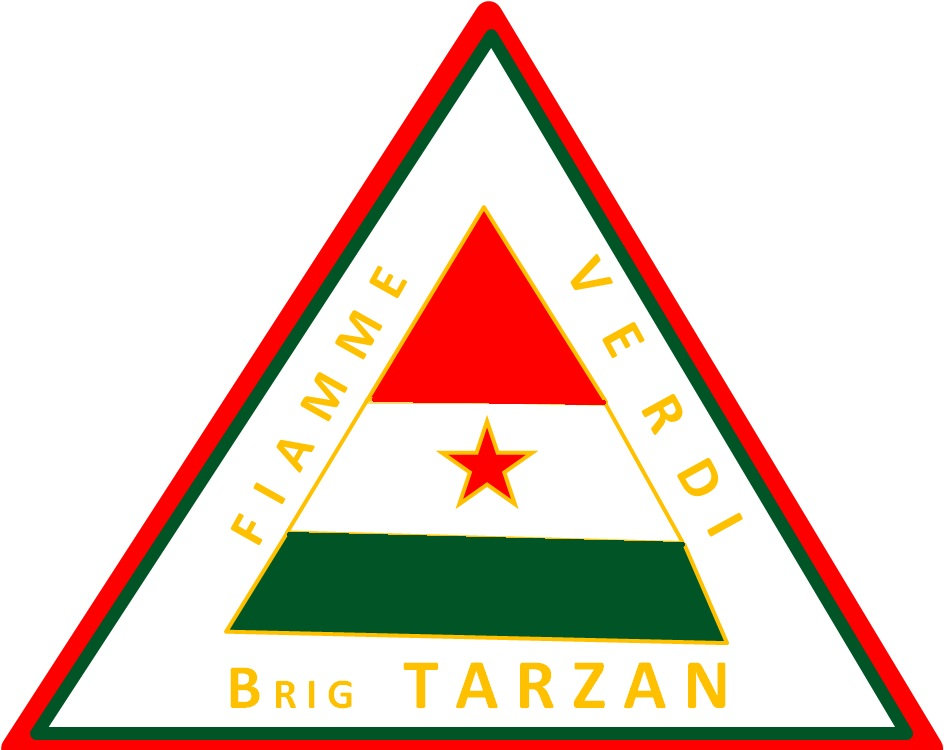 Fiamme Verdi Brigata Tarzan Emblema